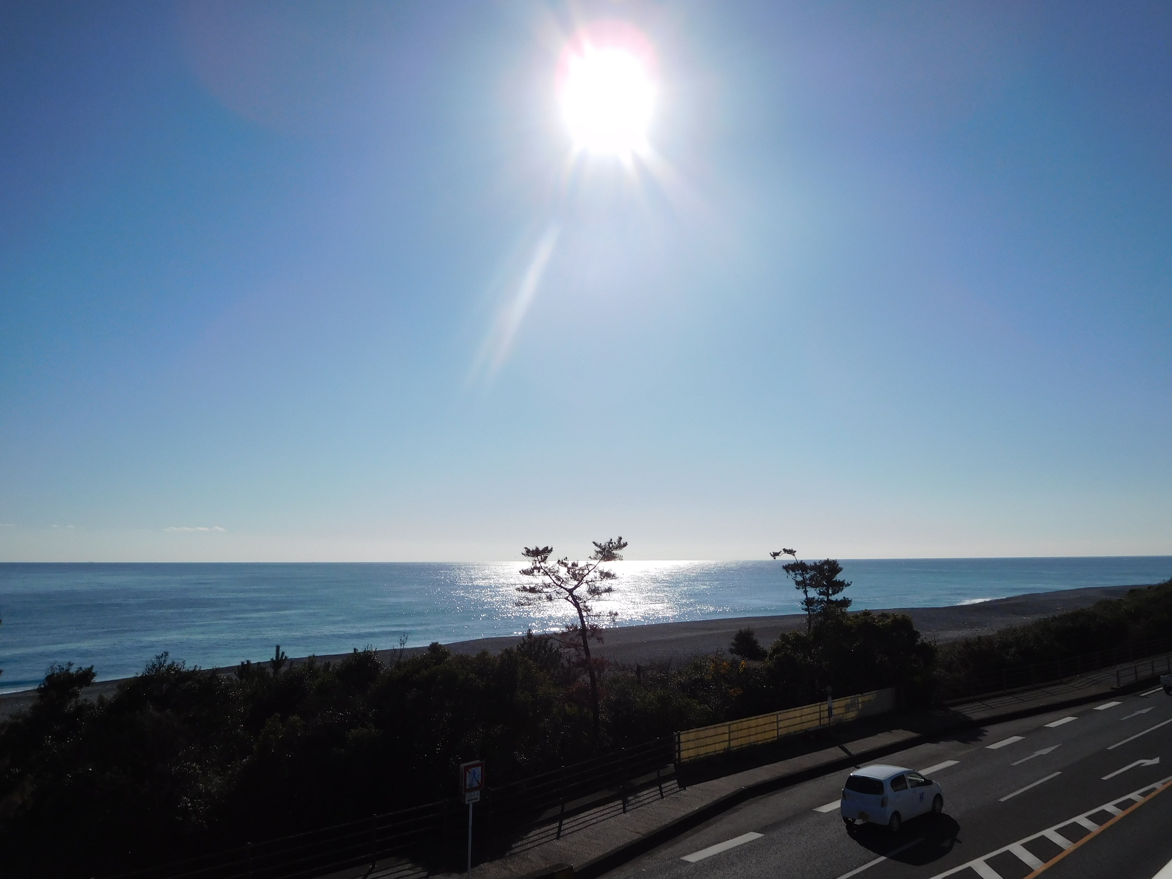 三重県南牟婁郡御浜町大字阿田和の七里御浜。